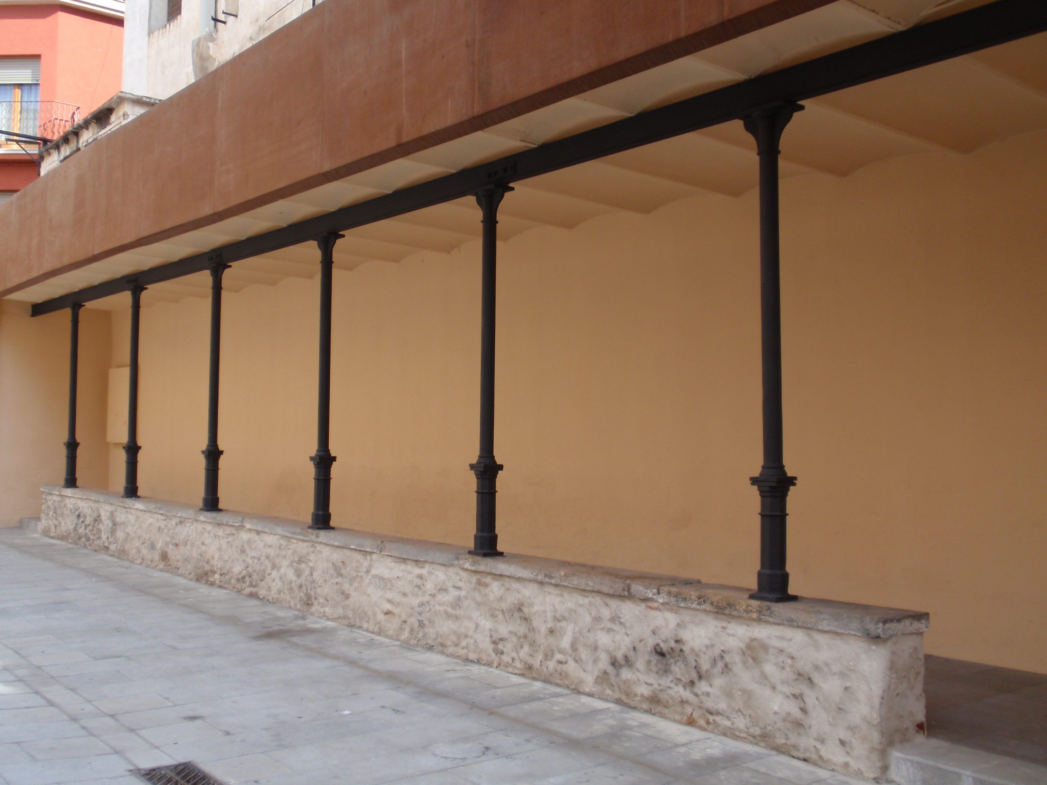 Peixateries velles - Mercat Municipal (Malgrat de Mar)